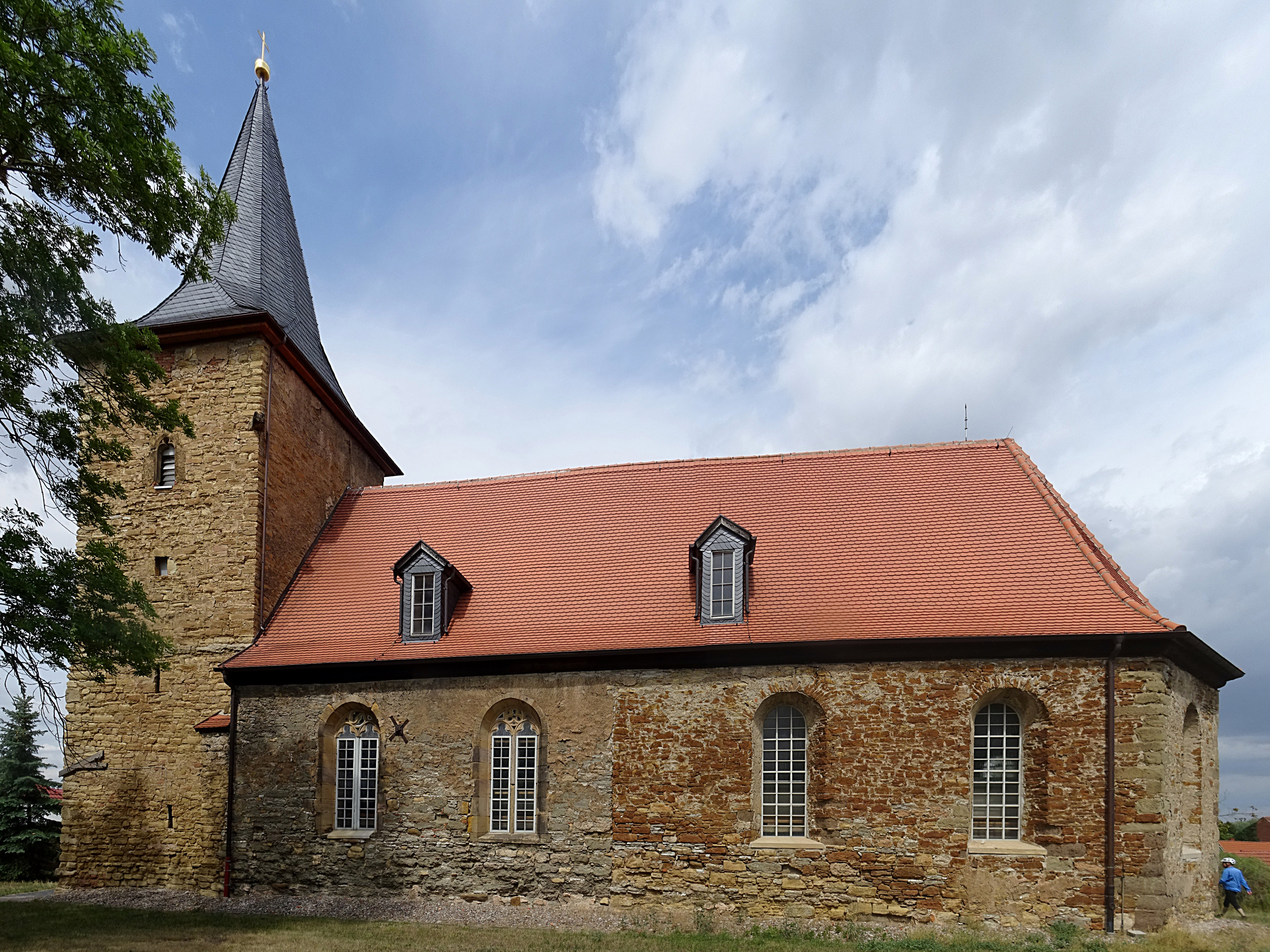 Dorfkirche St. Cyriakus in Schallenburg (Sömmerda) von Süden